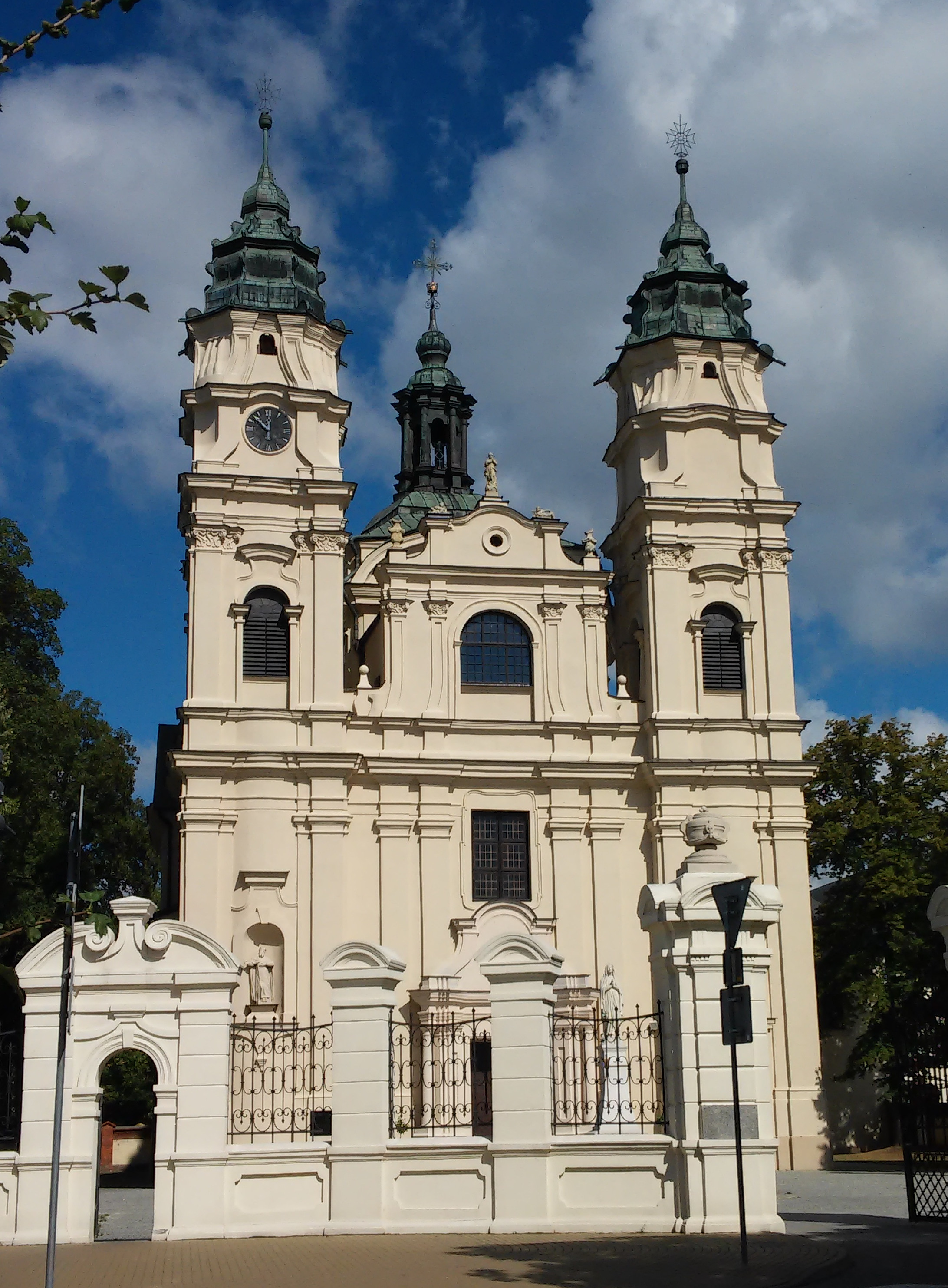 Włodawa, kościół, ob. par. p.w. św. Ludwika, XVIII